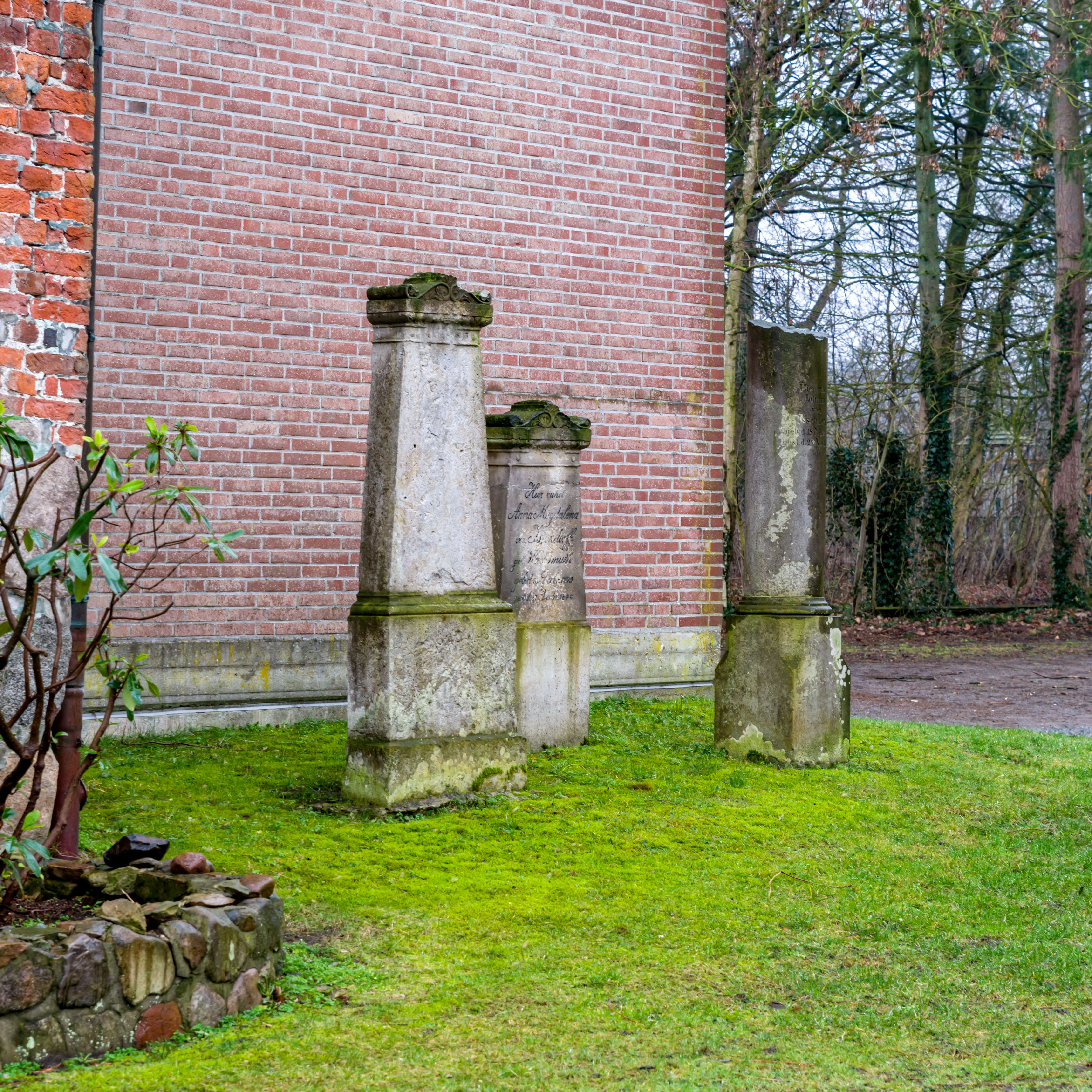 St. Marienkirche von 1384 in Hechthausen, Niedersachsen, Deutschland